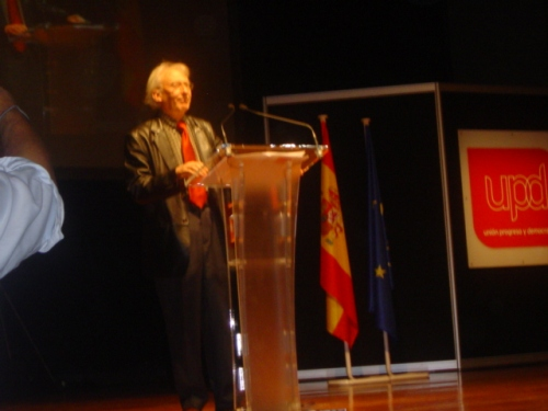 Acto fundacional UPD. Albert Boadella.